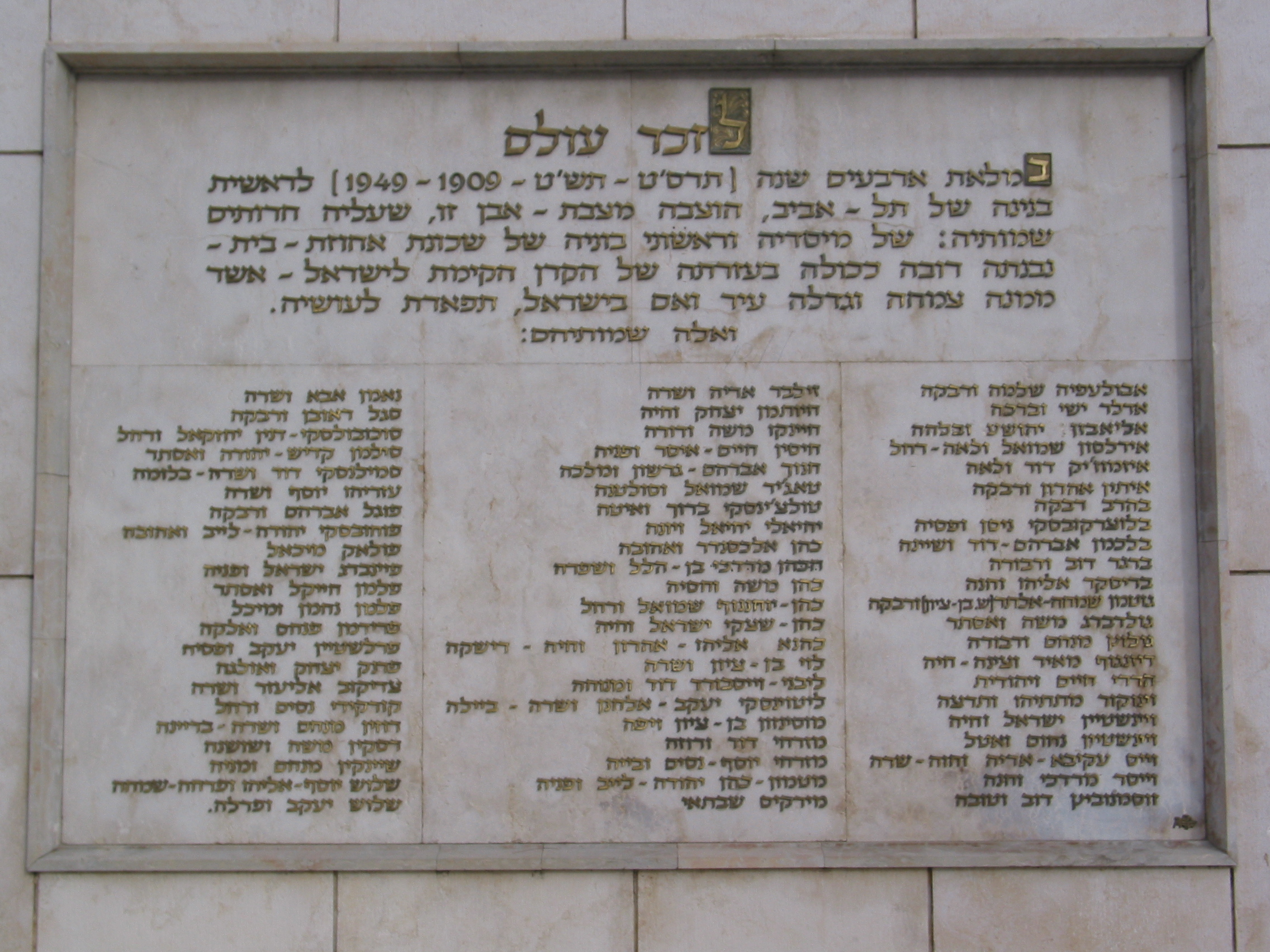 מצבה לזכר מייסדי אחוזת בית. נמצאת בשדרות רוטשילד פינת נחלת בנימין בתל אביב.